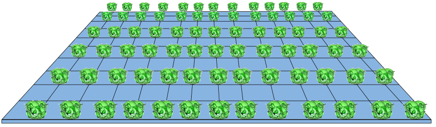 Des dimensions enroulées en espaces de Calabi-Yau, dans le contexte de la théorie de Kaluza-Klein